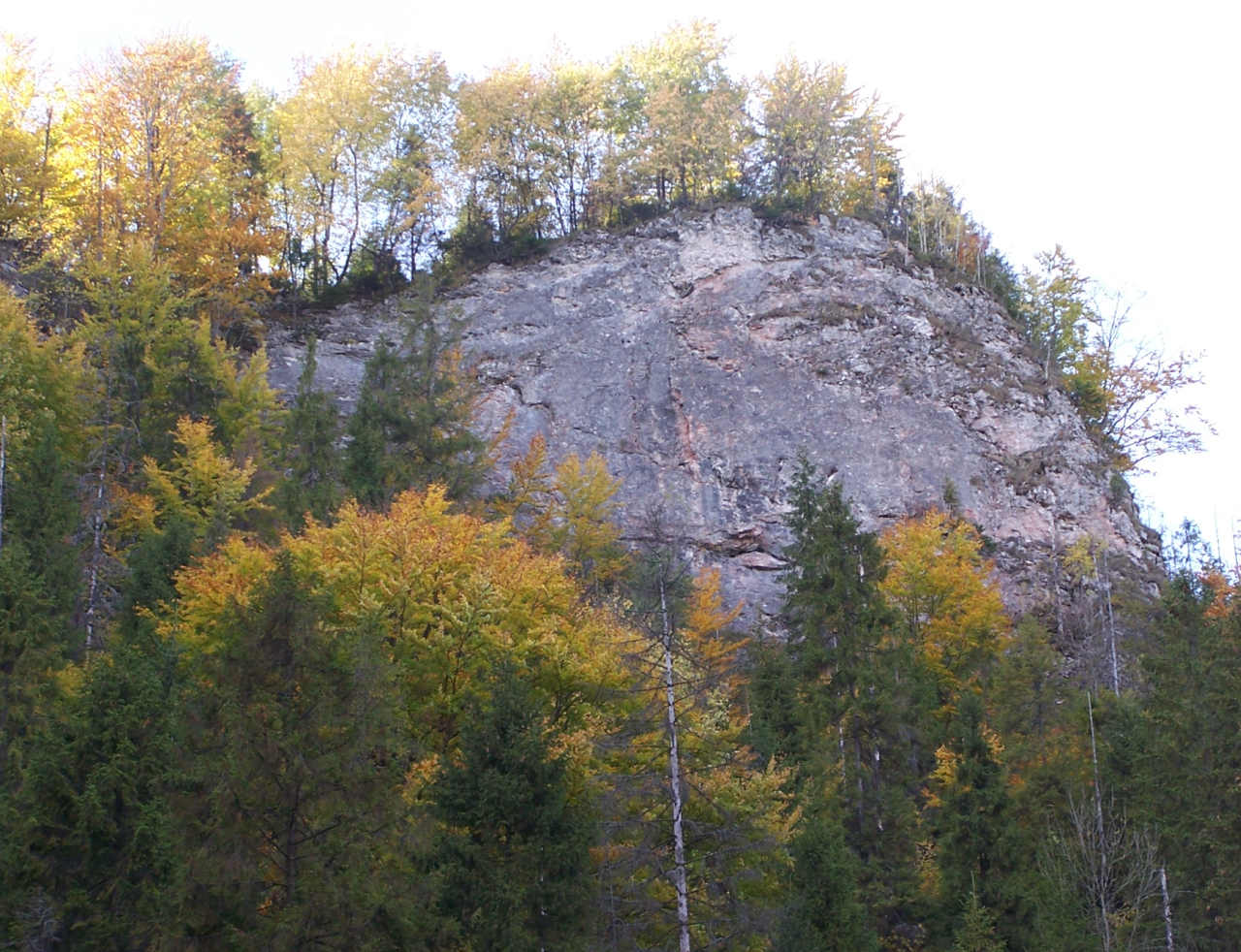 Wąwóz Homole (Pieniny)